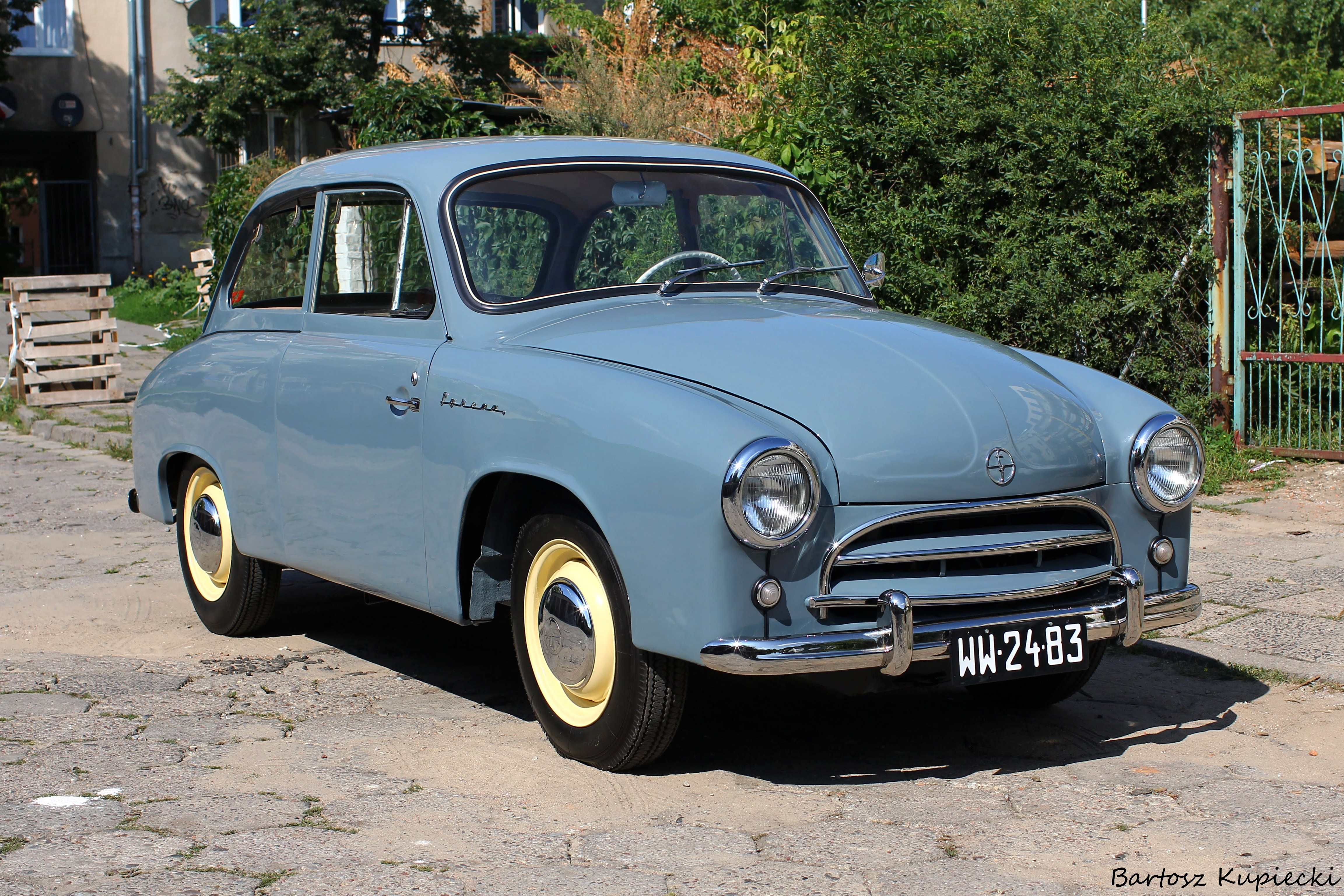 FSO Syrena 100 z 1960 roku. Widok ogólny.